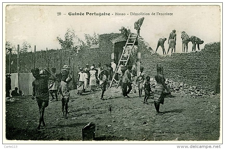 Postcard: PG No 20 - Guinée Portugaise - Bissao - Démolition de l'enceinte